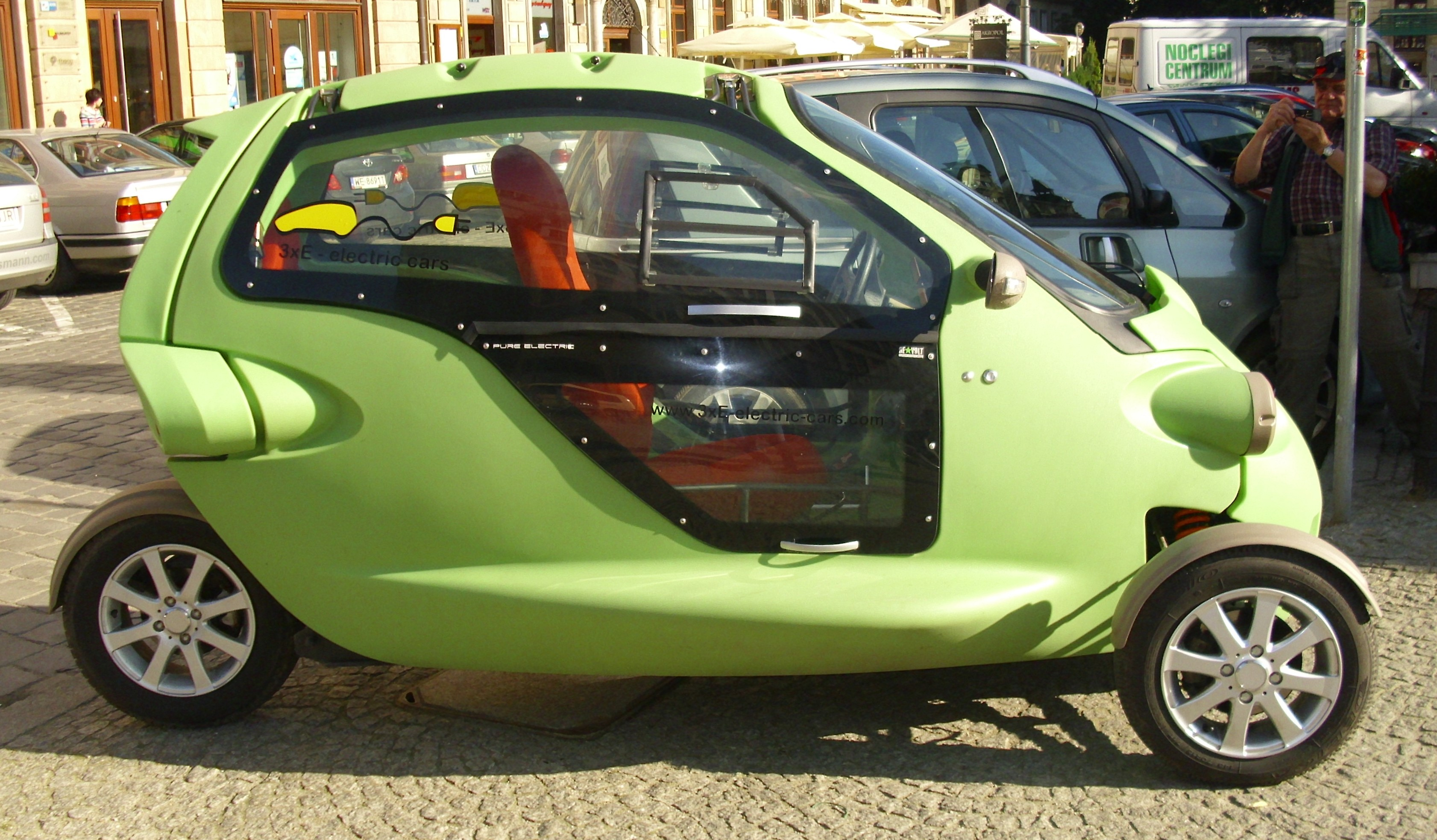 Sam Re-Volt